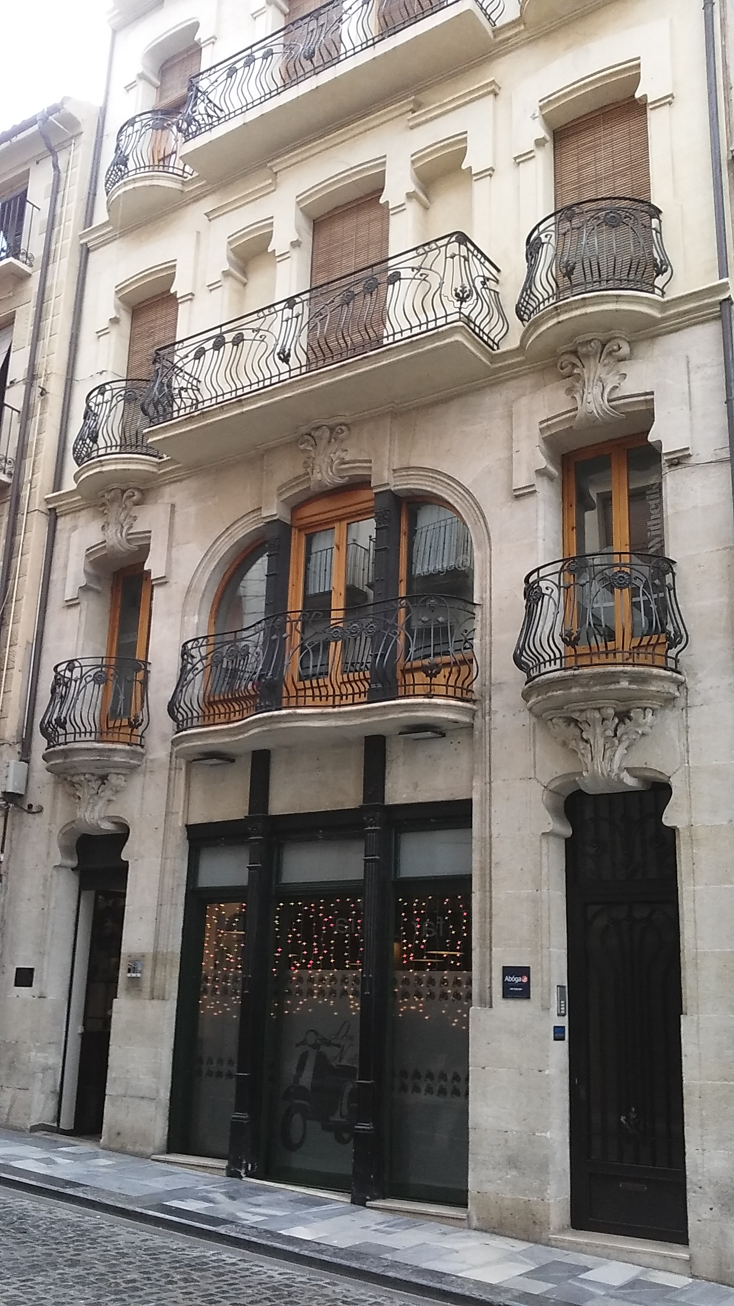 Edifici moderniste en Carrer Sant Nicolau 4 d'Alcoy (Alacant).